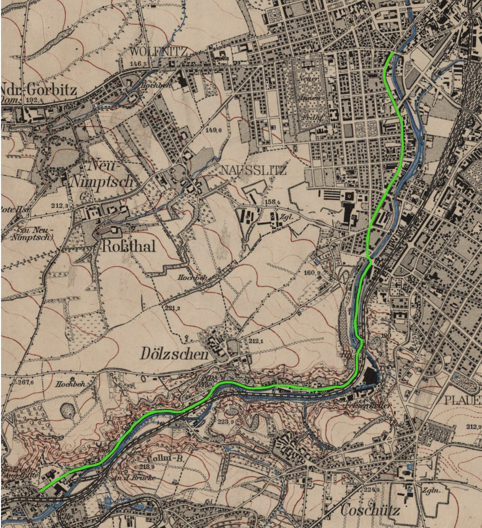 Topographische Karte (Messtischblätter) Sachsen, Ausschnitt Dresden, Abteilung für Landesaufnahme des Königl. Sächs. Generalstabes, 1:25000, 48 x 45 cm, Blatt 66, 1910.; Ausschnitt gewählt und Tharandter Straße hervorgehoben durch Inkowik